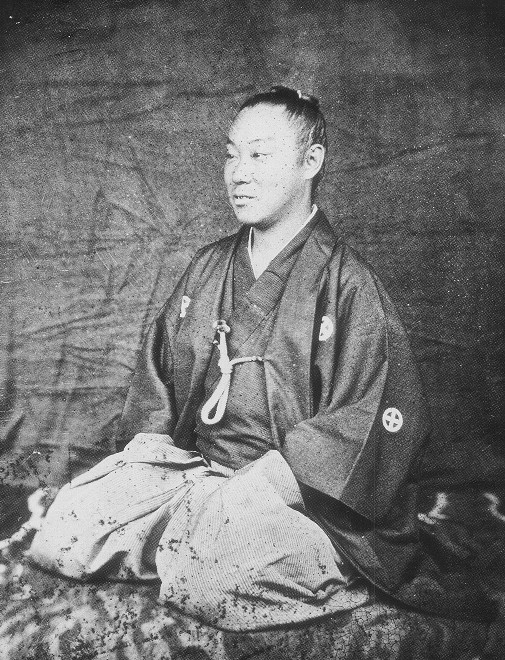 島津忠義。薩摩鹿児島藩最後の藩主。